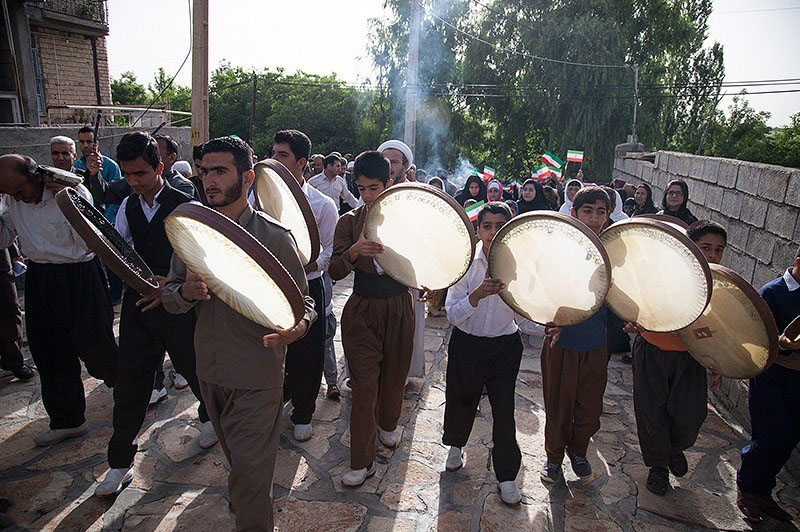 محمد مخبر رییس ستاد اجرایی فرمان حضرت امام (ره) به همراه علیرضا تابش رییس بنیاد مسکن انقلاب اسلامی روز چهارشنبه (۱۲ خرداد) به استان کرمانشاه سفر کردند. امضای تفاهم ‌نامه سه جانبه ساخت هزار واحد مسکونی برای محرومین استان کرمانشاه و بازدید از چند پروژه عمرانی از جمله برنامه ها بود.